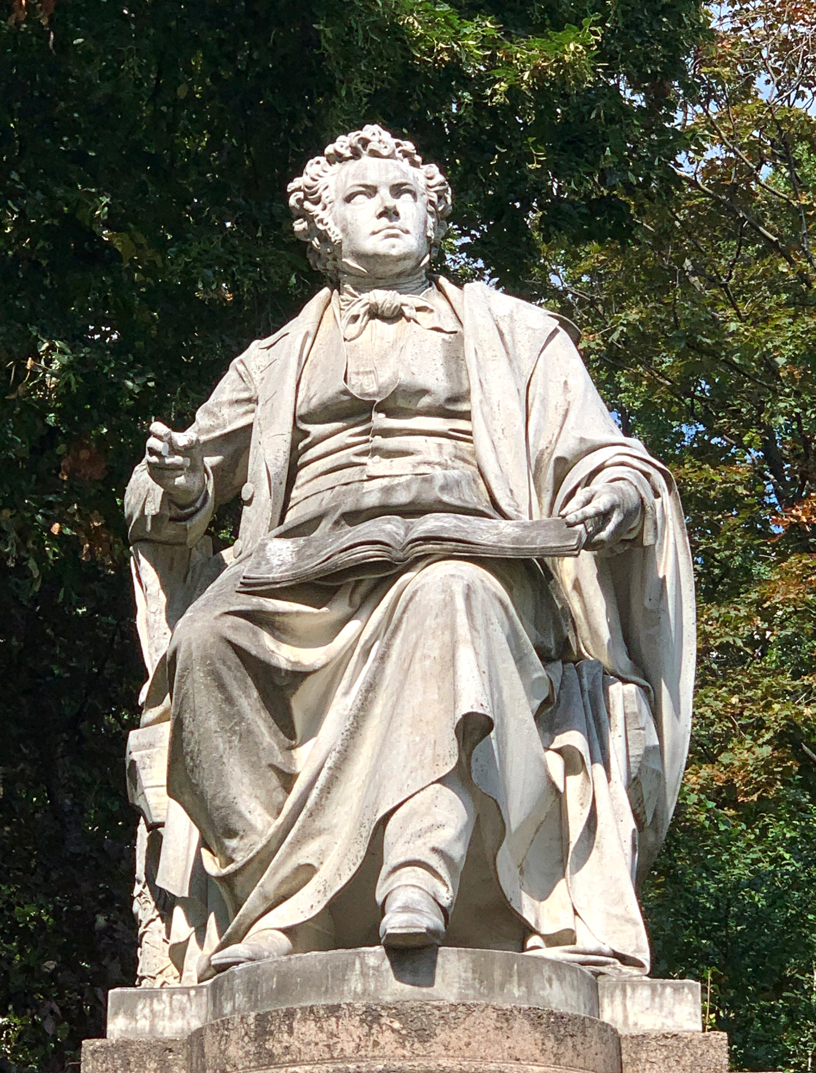 Monument à Schubert, Stadtpark (Vienne).